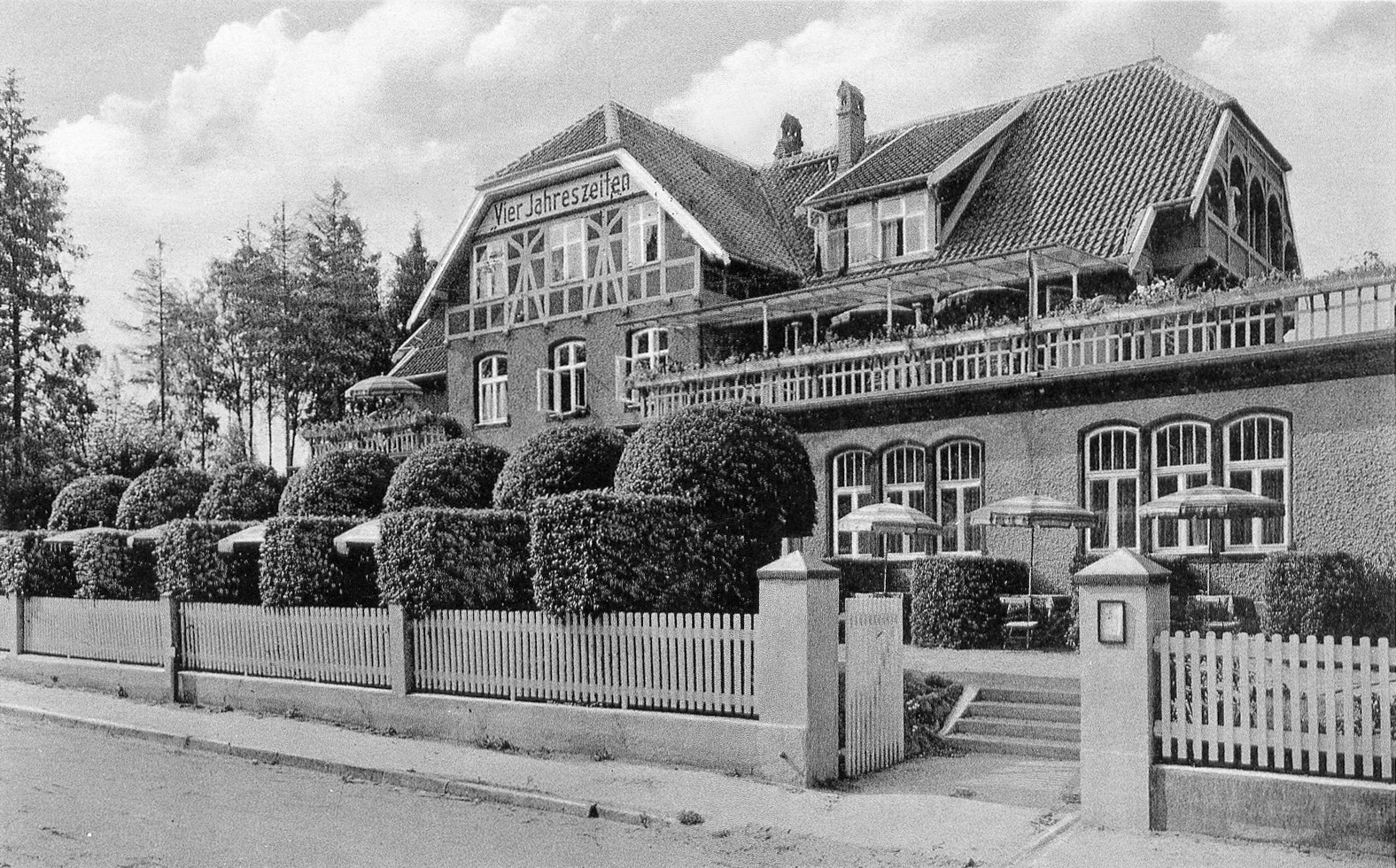 Отель Vier Jahreszeiten, Георгенсвальде. Почтовая открытка начала XX века. Опубликована в книгах Светлогорск. Янтарный курорт России. / Авт.-сост. В. И. Воронов. Вильнюс: Standartu Spaustuve, 2011. — ISBN 978-9555-488-53-8 Invalid ISBN и Путешествие по Балтийскому побережью Замланда / Авт.-сост. В. И. Воронов; пер. с нем. Е. Мингалевой. — Калининград, 2009. — ISBN 978-9955-488-37-8. С. 83-85.